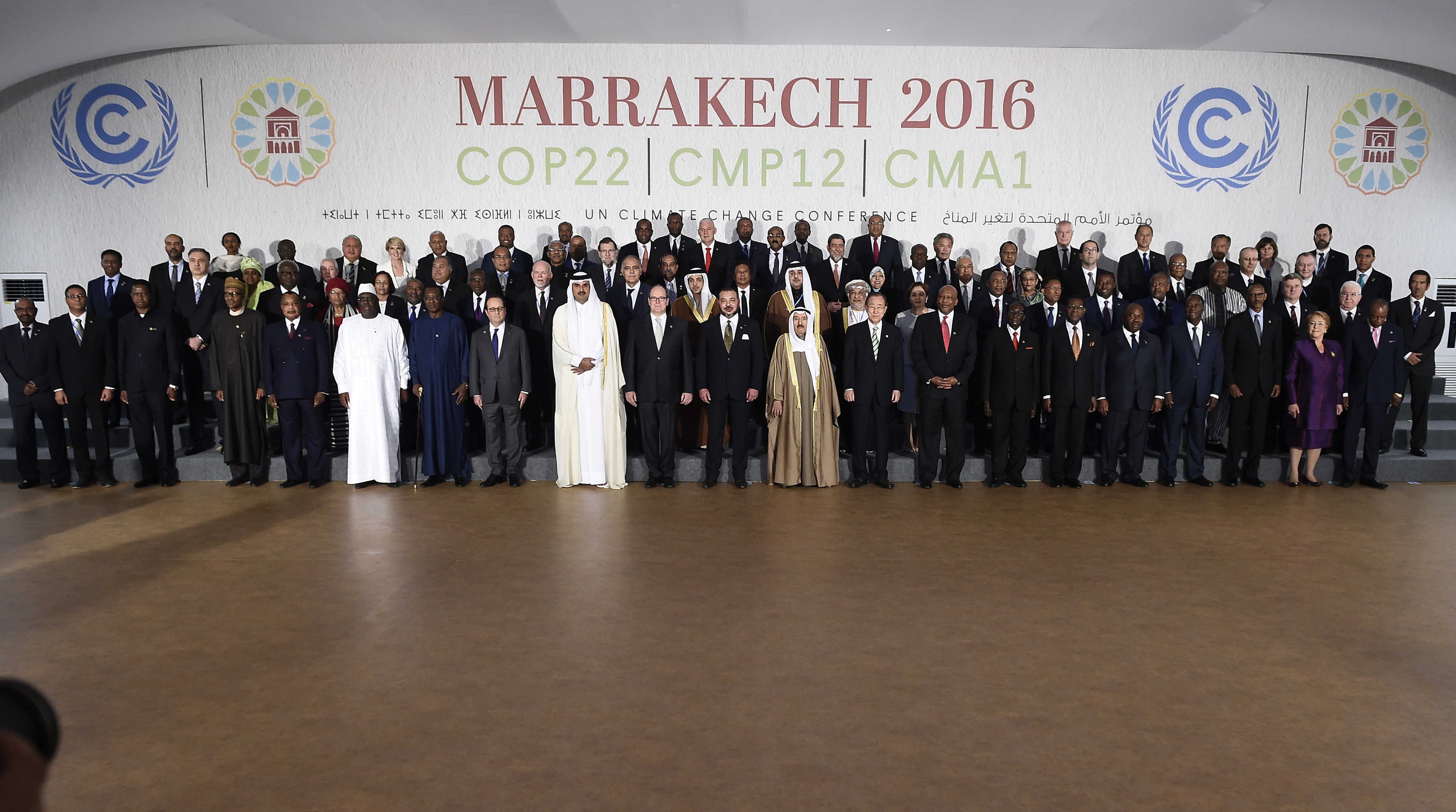 Gobierno de Chile